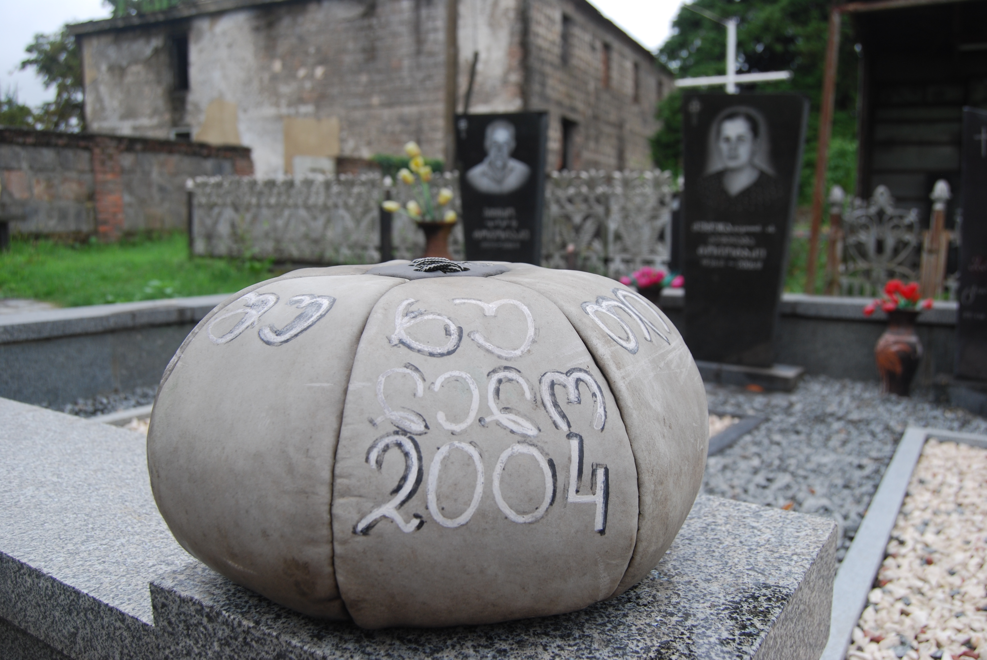 ლელოს ბურთი შუხუთში, სასაფლაოზე